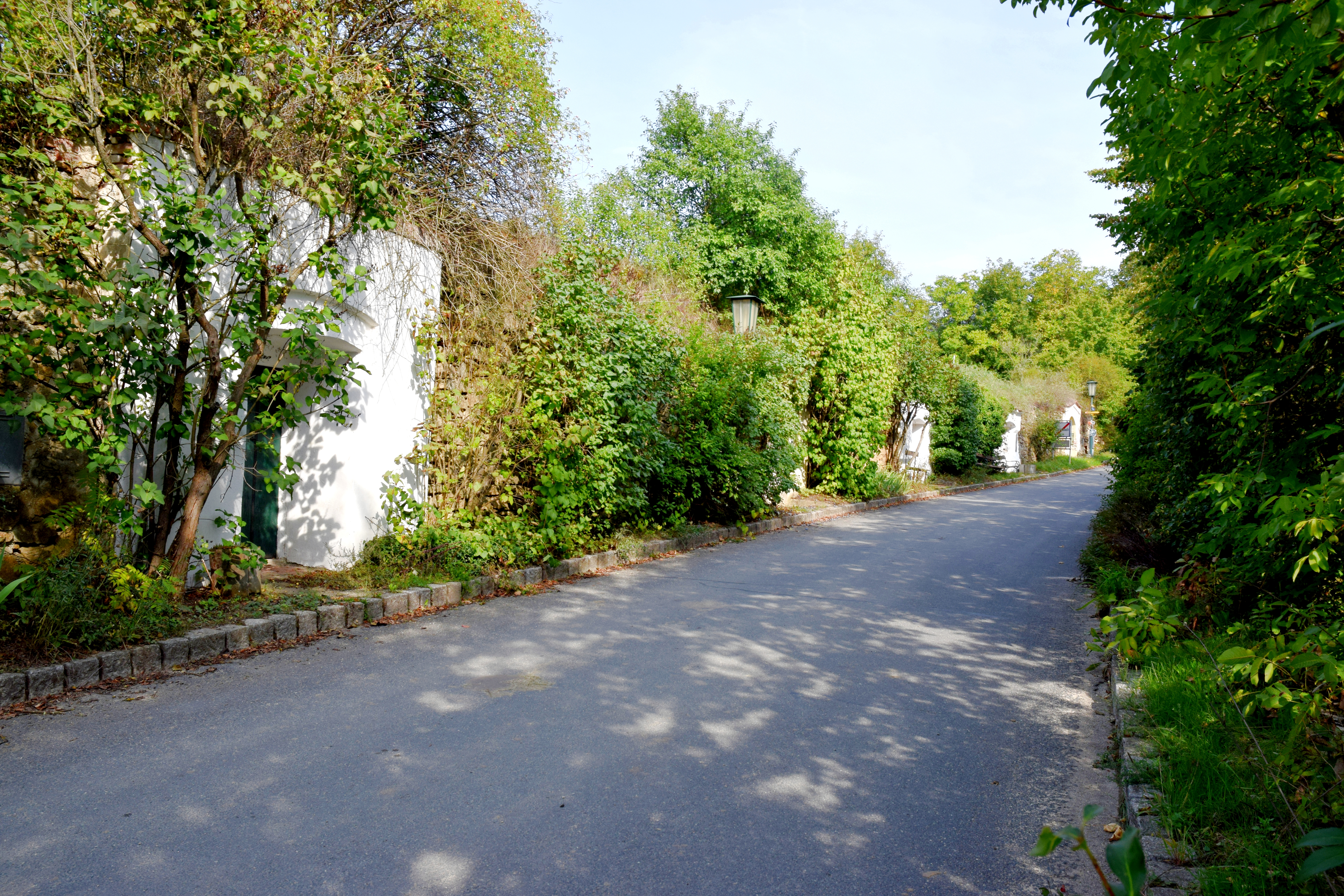 Kellergasse „Niederfladnitzer Straße“ in der KG Oberretzbach in Retzbach